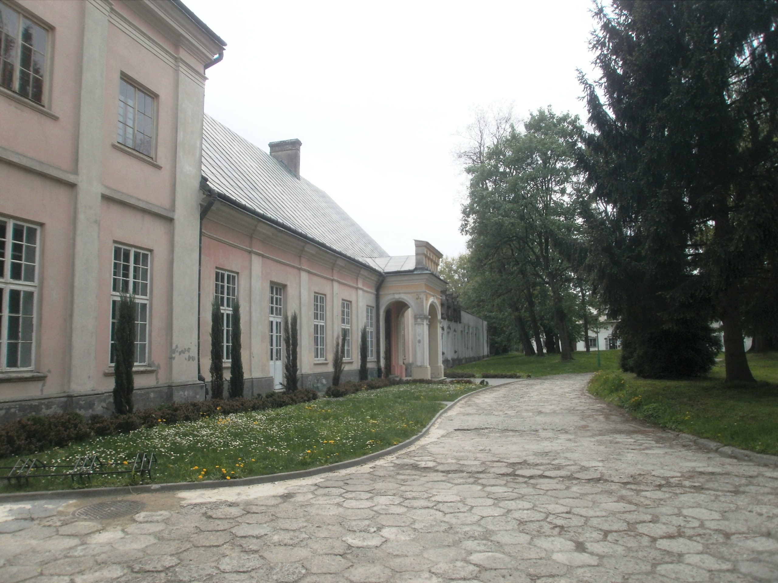 Boguchwała, pałac, 2 ćw. XVIII